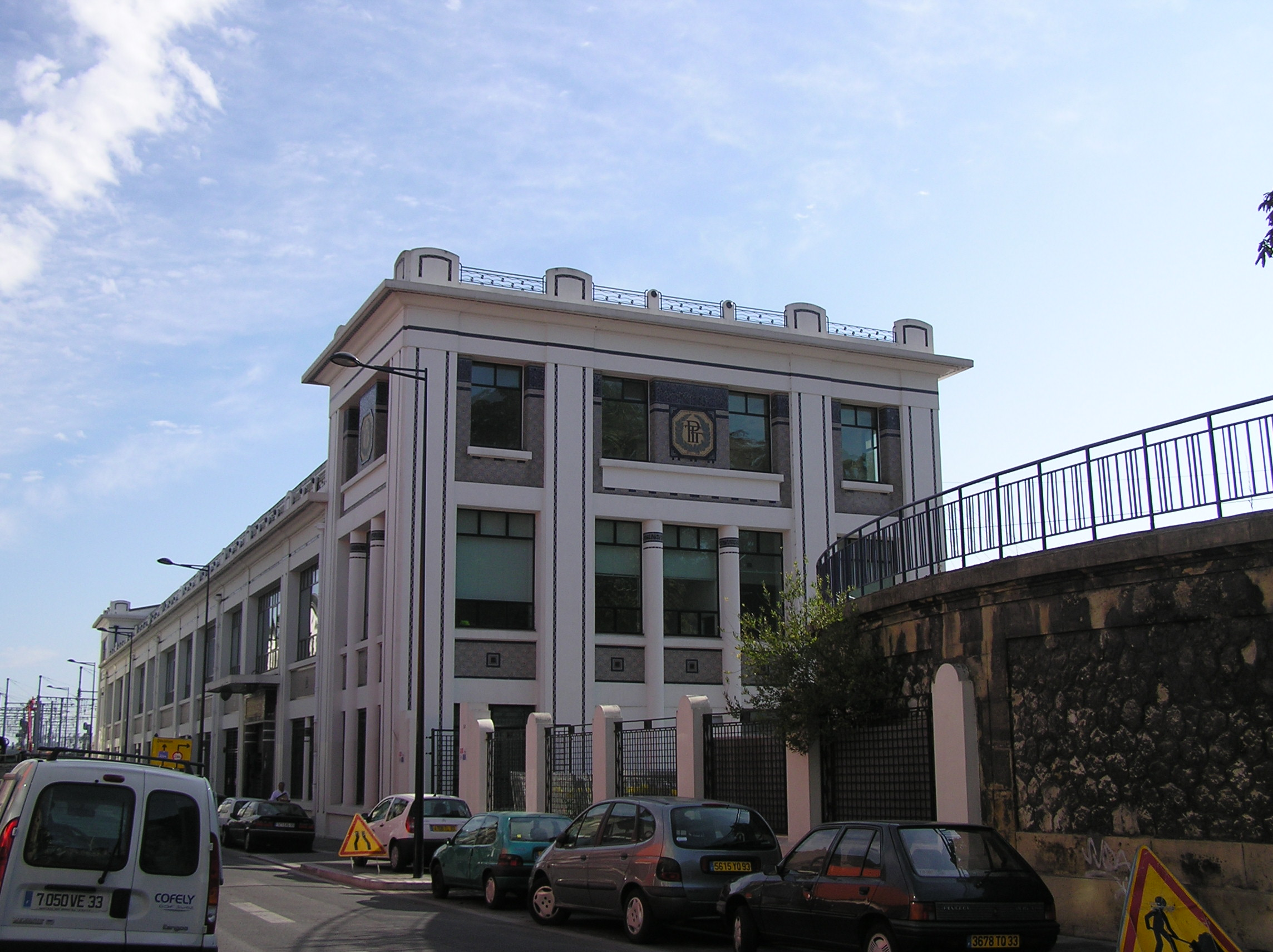 Bordeaux (Gironde, Aquitaine, France) : Ancien Centre de tri Saint-Jean.